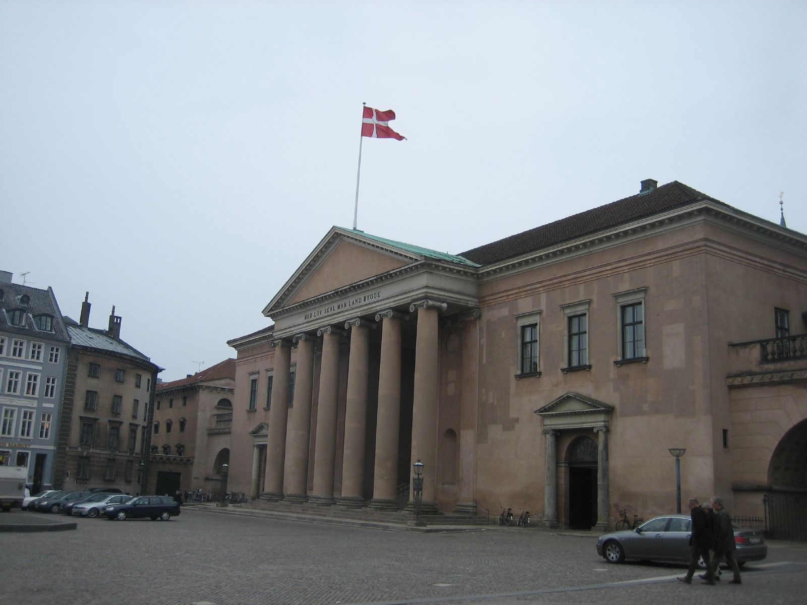 Copenhagen Court House at Gammeltorv in Copenhagen, Denmark